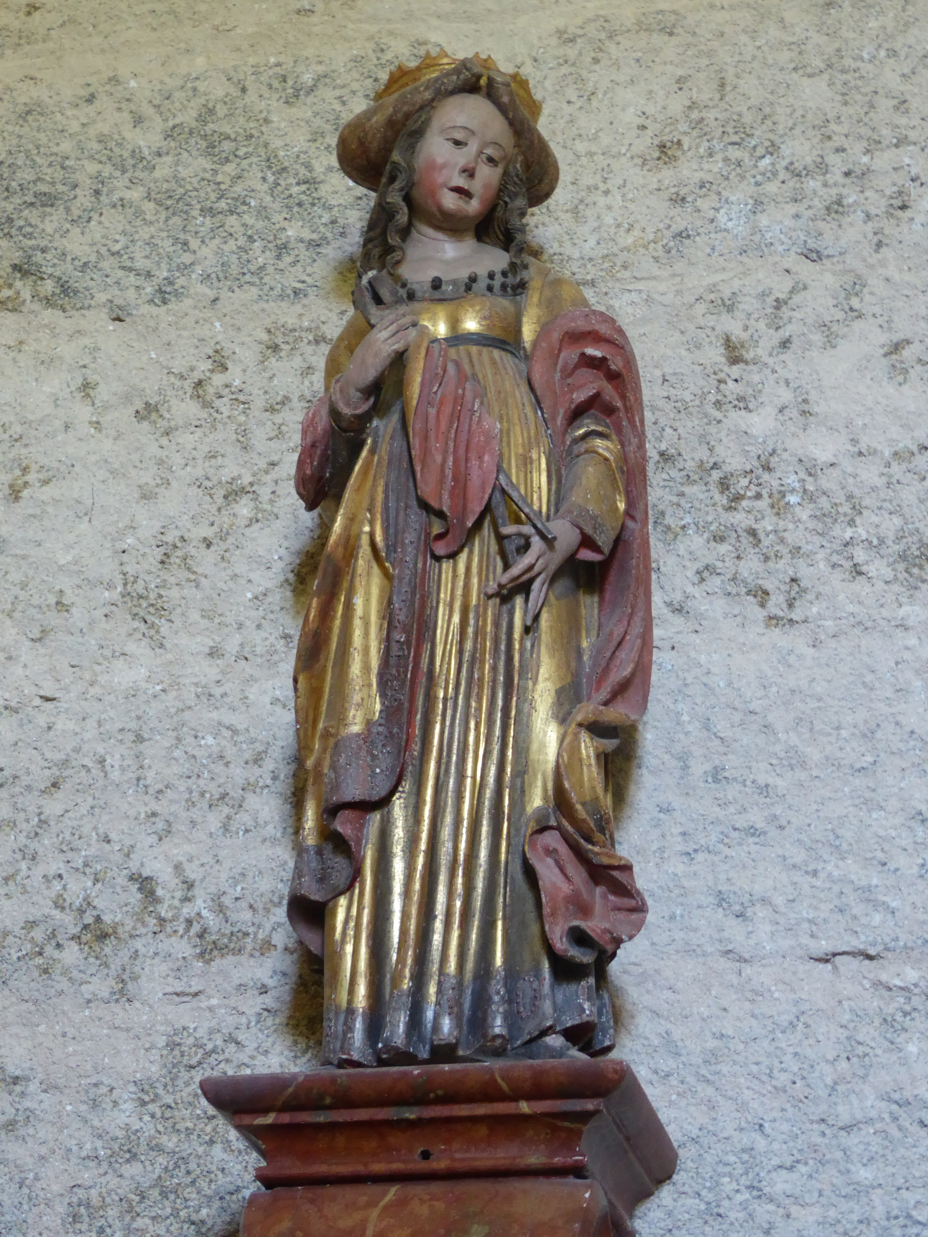 Filialkirche hll. Petrus und Paulus, Altweitra, Unserfrau-Altweitra, Niederösterreich - Statue hl. Apollonia (um 1520)